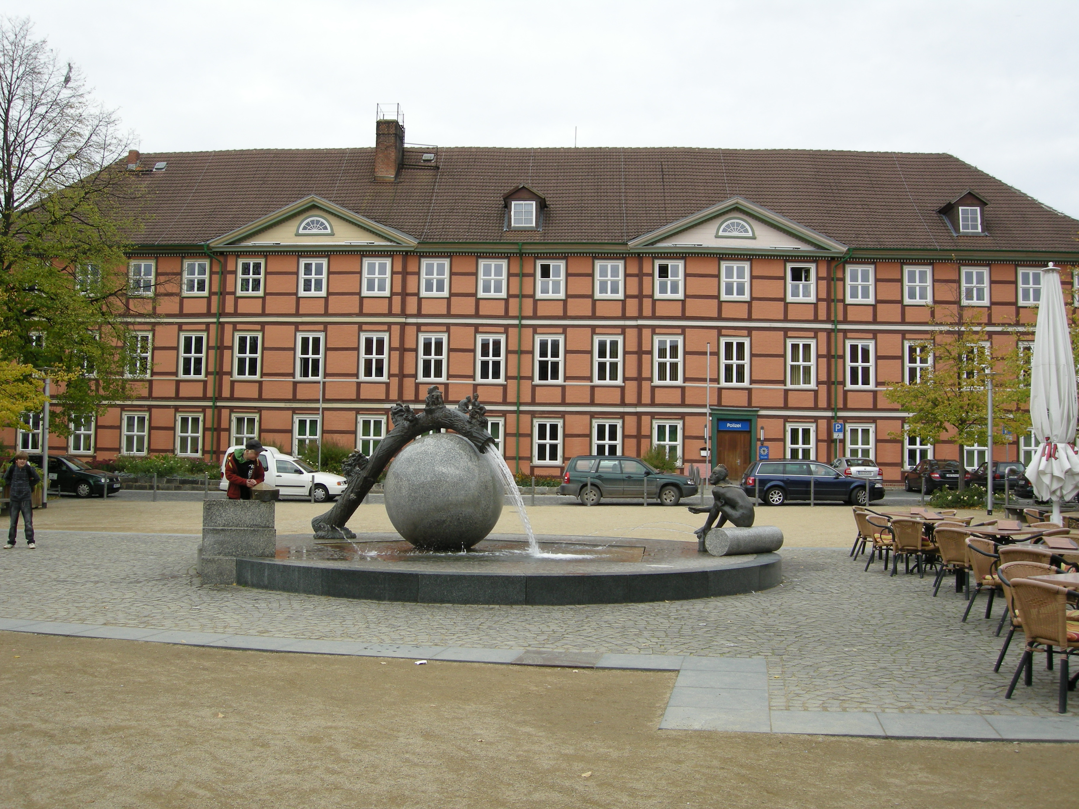 Nikolaiplatz-Brunnen mit Nikolaus (rechts) von Bernd Göbel und dem ehemaligen Nikolaihospital im Hintergrund